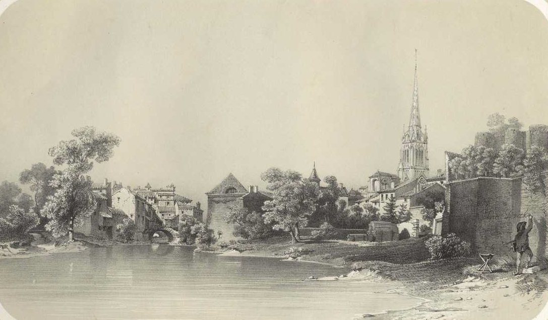 Vue de Fontenay-le-Comte